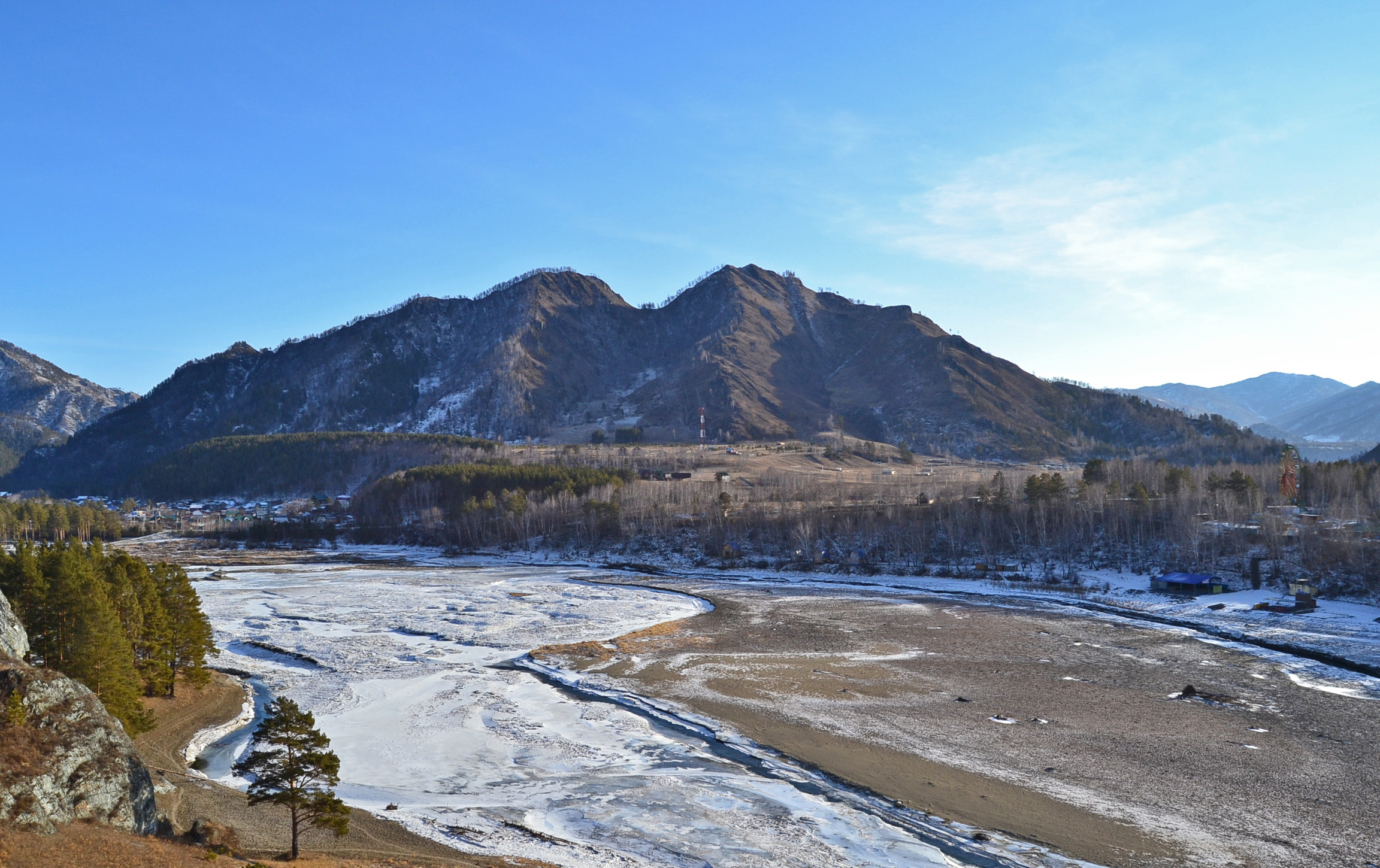 100 метров до ее впадения в Катунь, раньше тут было водохранилище Чемальской ГЭС, которая ныне не действует